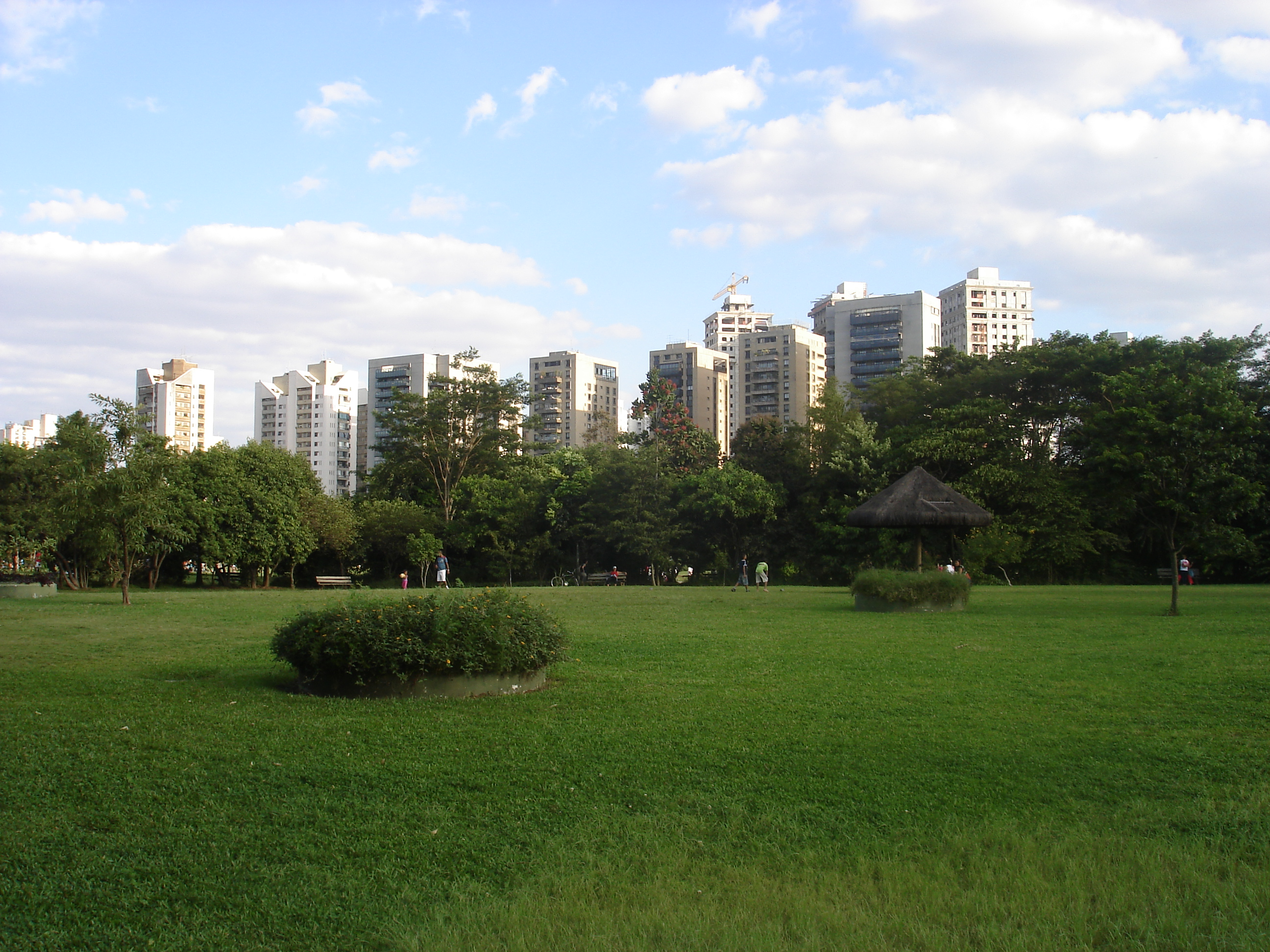 Villa-Lobos park, in São Paulo